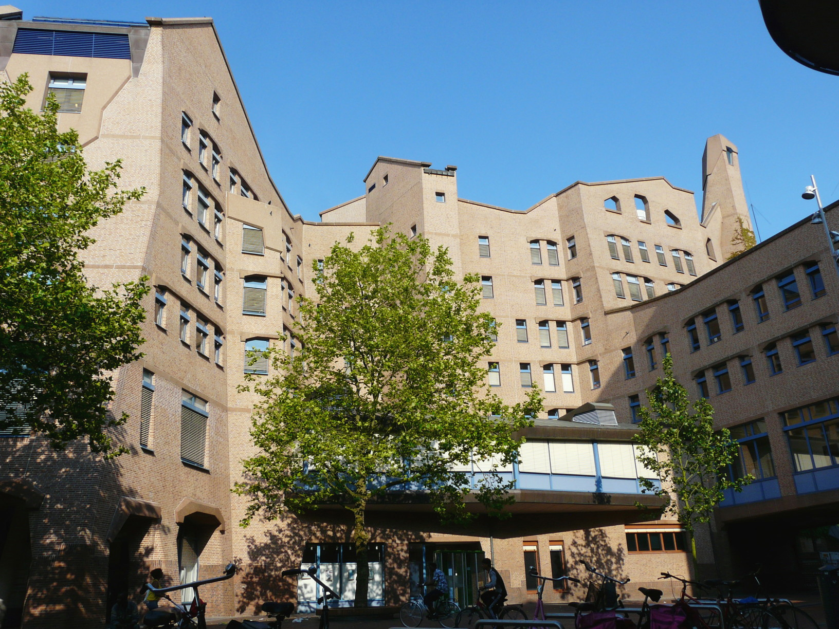 Voorkant ING kantoor, Amsterdamse Poort, Amsterdam. Gebouw onworpen door architecten Ton Alberts en Max van Huut en in 1987 door de NMB Bank gebouwd. Front side of the ING Bank office in Amsterdam, The Netherlands. The building has been designed by architects Ton Alberts en Max van Huut. and was constructed by the NMB Bank in 1987. Foto gemaakt op 25 juni 2009 tijdens rondleiding ING gebouw Amsterdamse Poort, Bijlmermeer, Amsterdam in het kader van Wiki Loves Art Nederland. Photo taken on 25 June 2009 during an event of the Wiki Loves Art project NL.